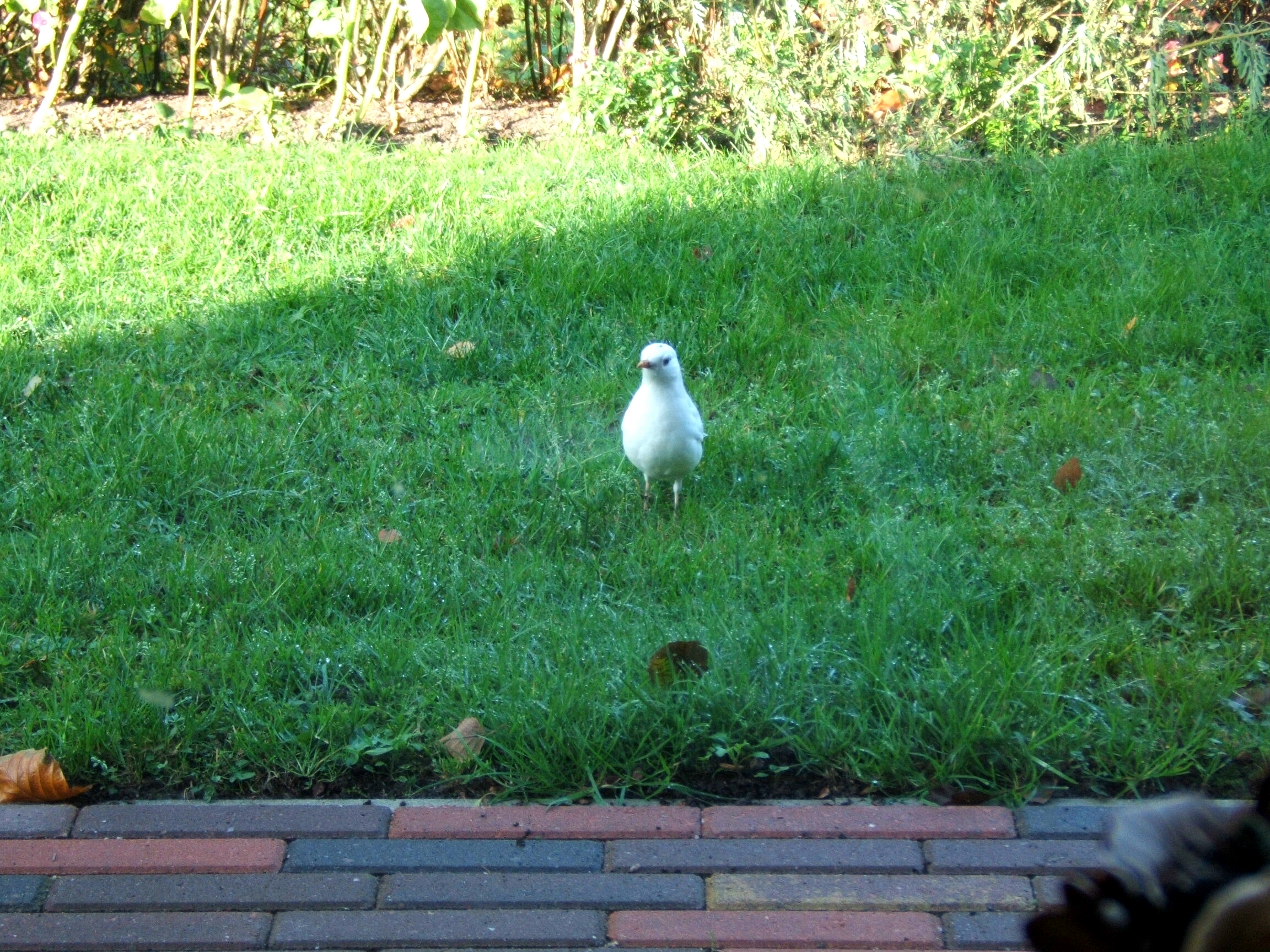 Witte Merel (albino)